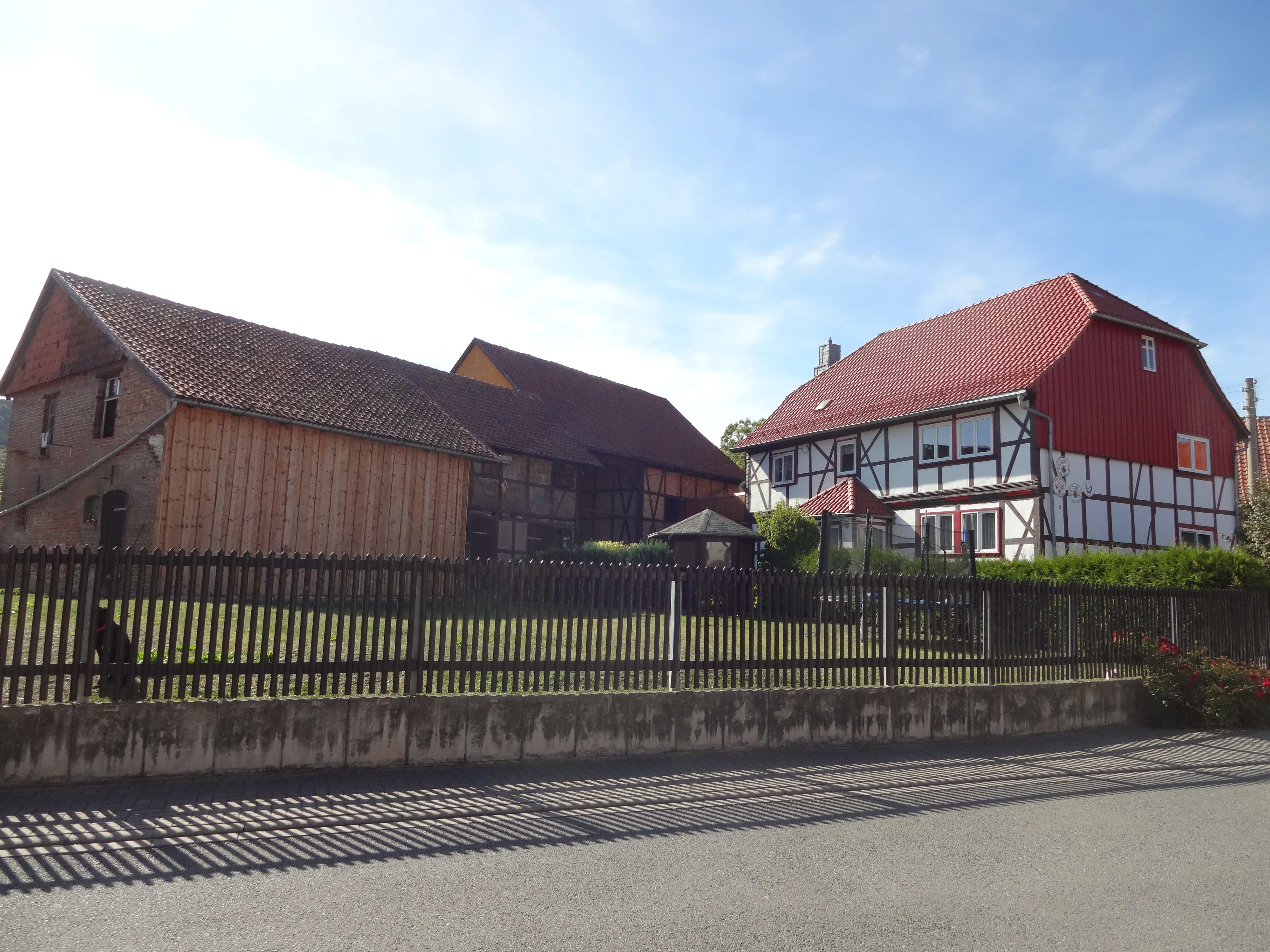 denkmalgeschützter Bauernhof im Steinweg 5 in Drübeck